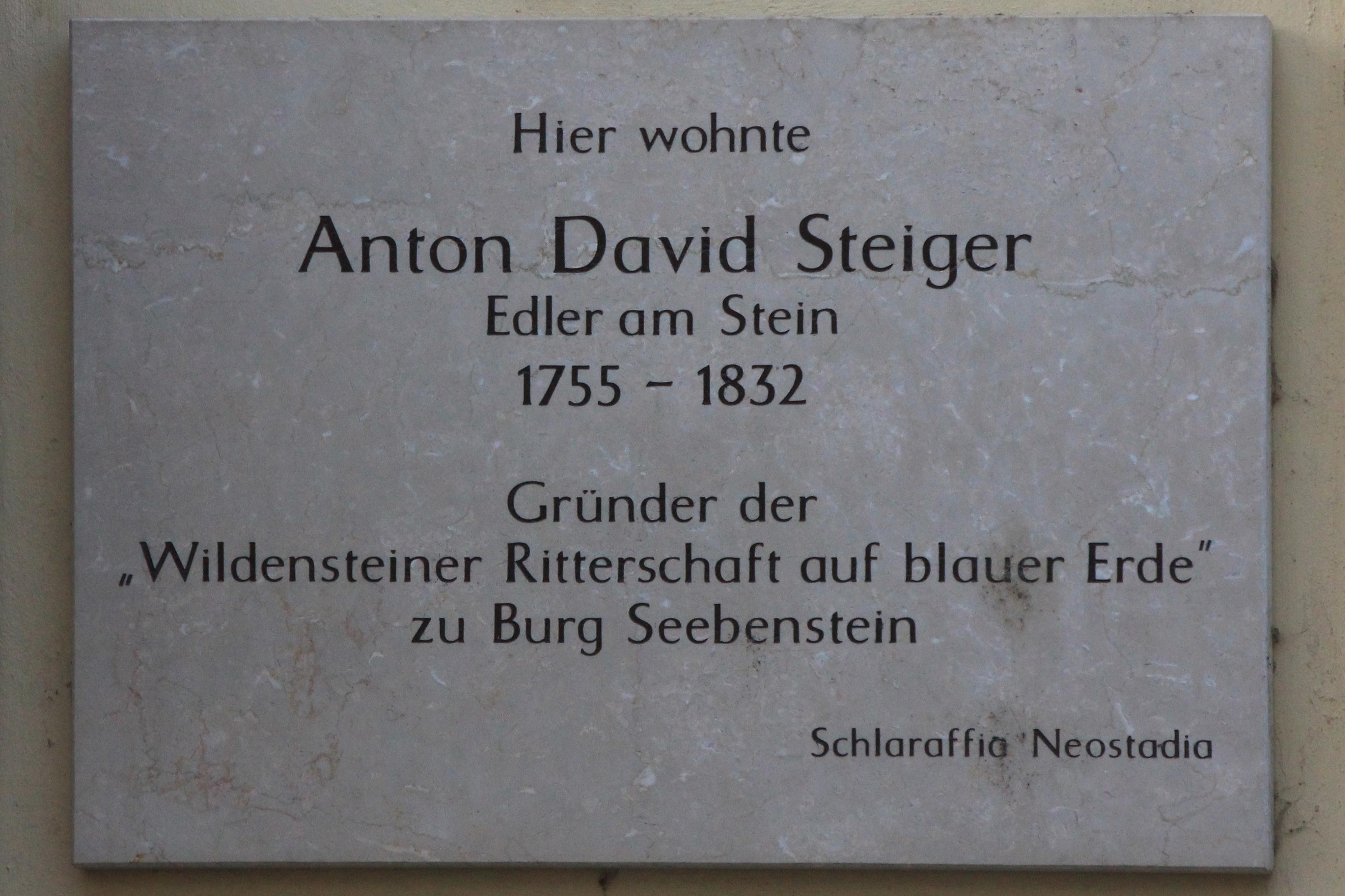 Tafel für Anton David Steiger in Wiener Neustadt